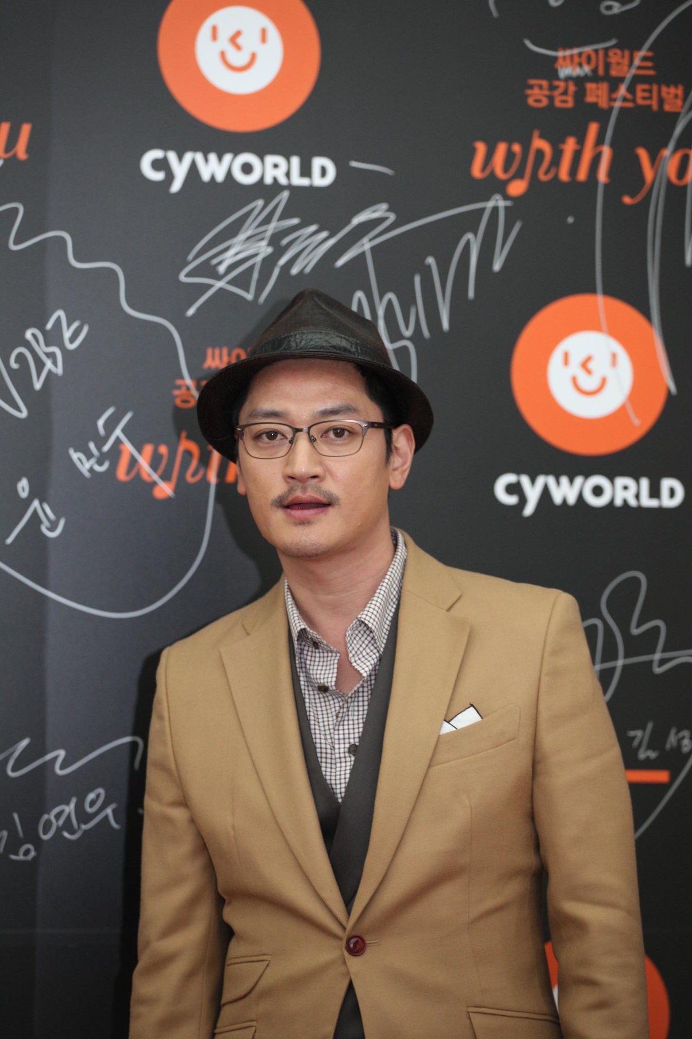 2011 싸이월드 공감 페스티벌